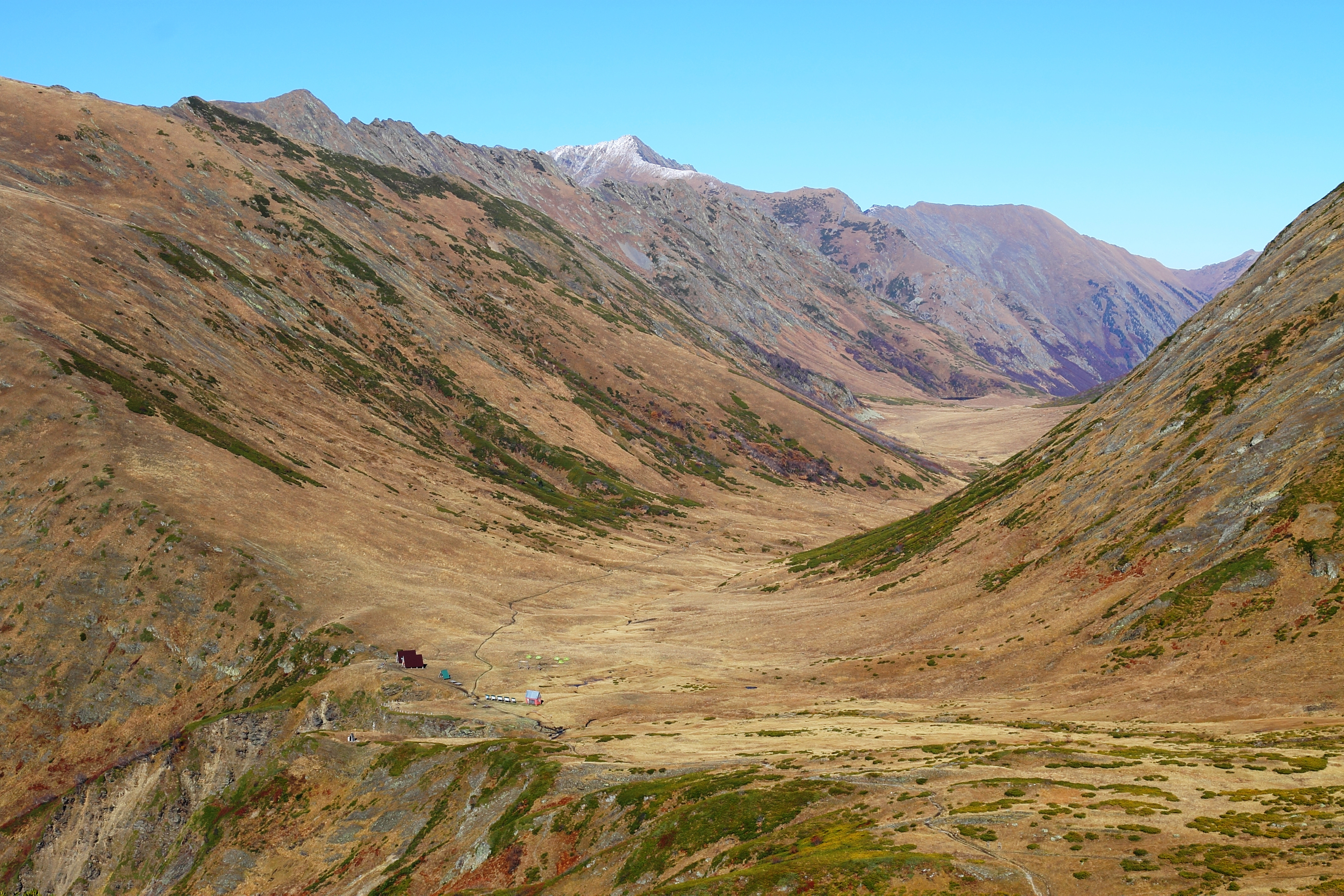 Бзерпинский карниз и троговая долина перевала Псеашхо. Вид с горы Табунной. Кавказский государственный природный биосферный заповедник.: Кавказский государственный природный биосферный заповедник расположен на северном и южном склонах Западного Кавказа в координатах 44 - 44.5° северной широты и 40 - 41° восточной долготы. Заповедник занимает земли Краснодарского края, Республики Адыгея и Карачаево-Черкесской Республики РФ, вплотную примыкает к государственной границе с Абхазией. В отрыве от основной территории, в Хостинском районе Сочи, расположен субтропический Хостинский отдел заповедника - всемирно известная тисо-самшитовая роща, площадью 302 га,Сочи,, Краснодарский край This image is related to the protected area of Russia number 2300002